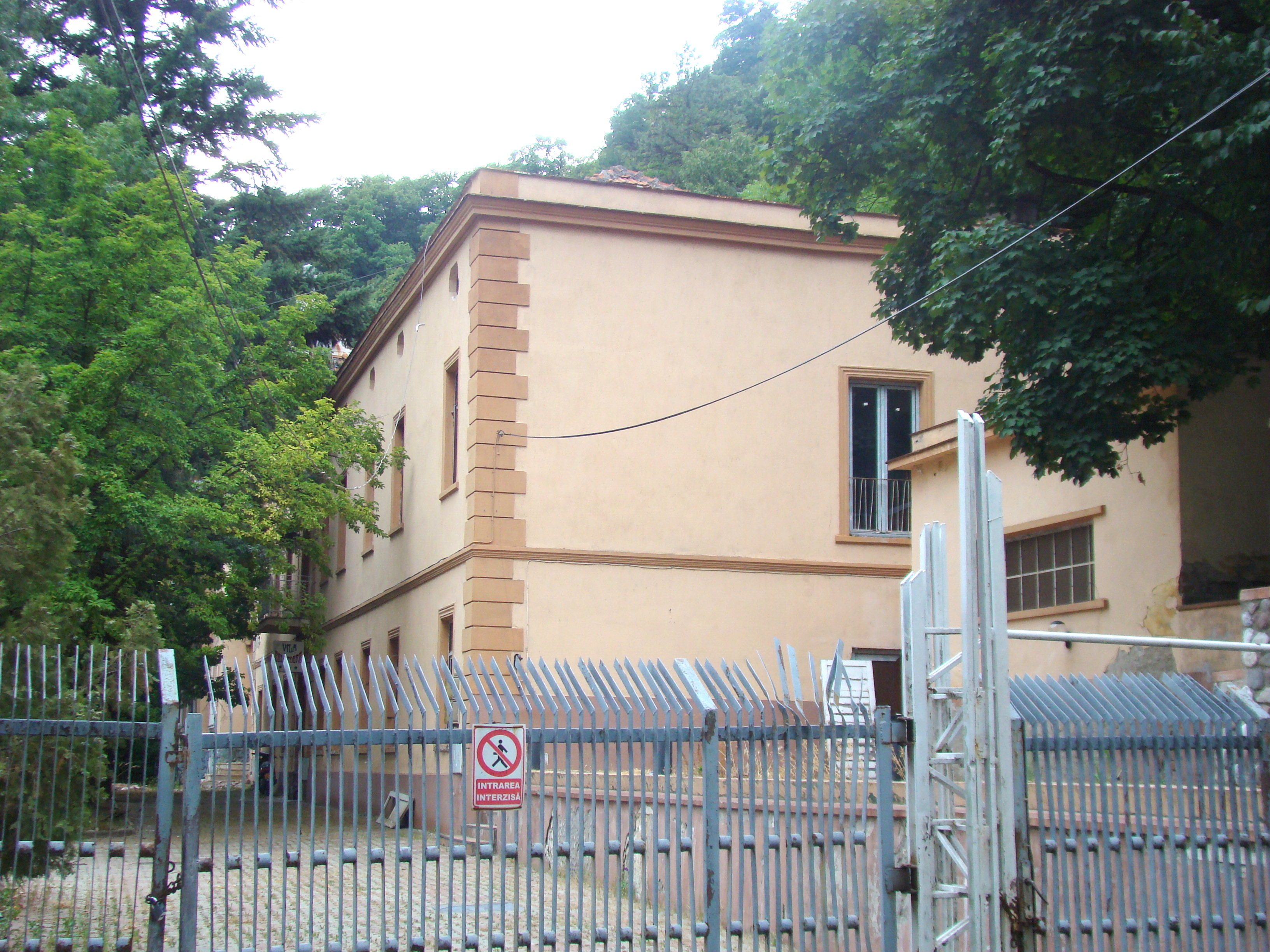 Vila „Vălușescu” ("Belvedere"), oraș Băile Herculane, Str. Stoica de Hațeg Nicolae 6